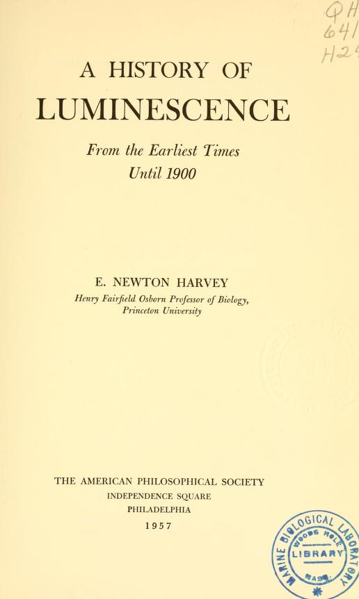 Erken zamanlardan 1900'lü yıllara kadar lüminesansın tarihi üzerine E. Newton Harvey tarafından yazılmış, Amerikan Felsefe Topluluğu tarafından basılmış eser.